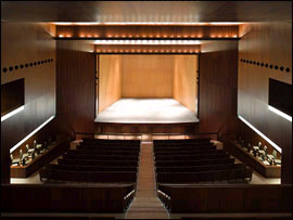 Teatro Pedro Muñoz Seca, vista interior. El Puerto de Santa María